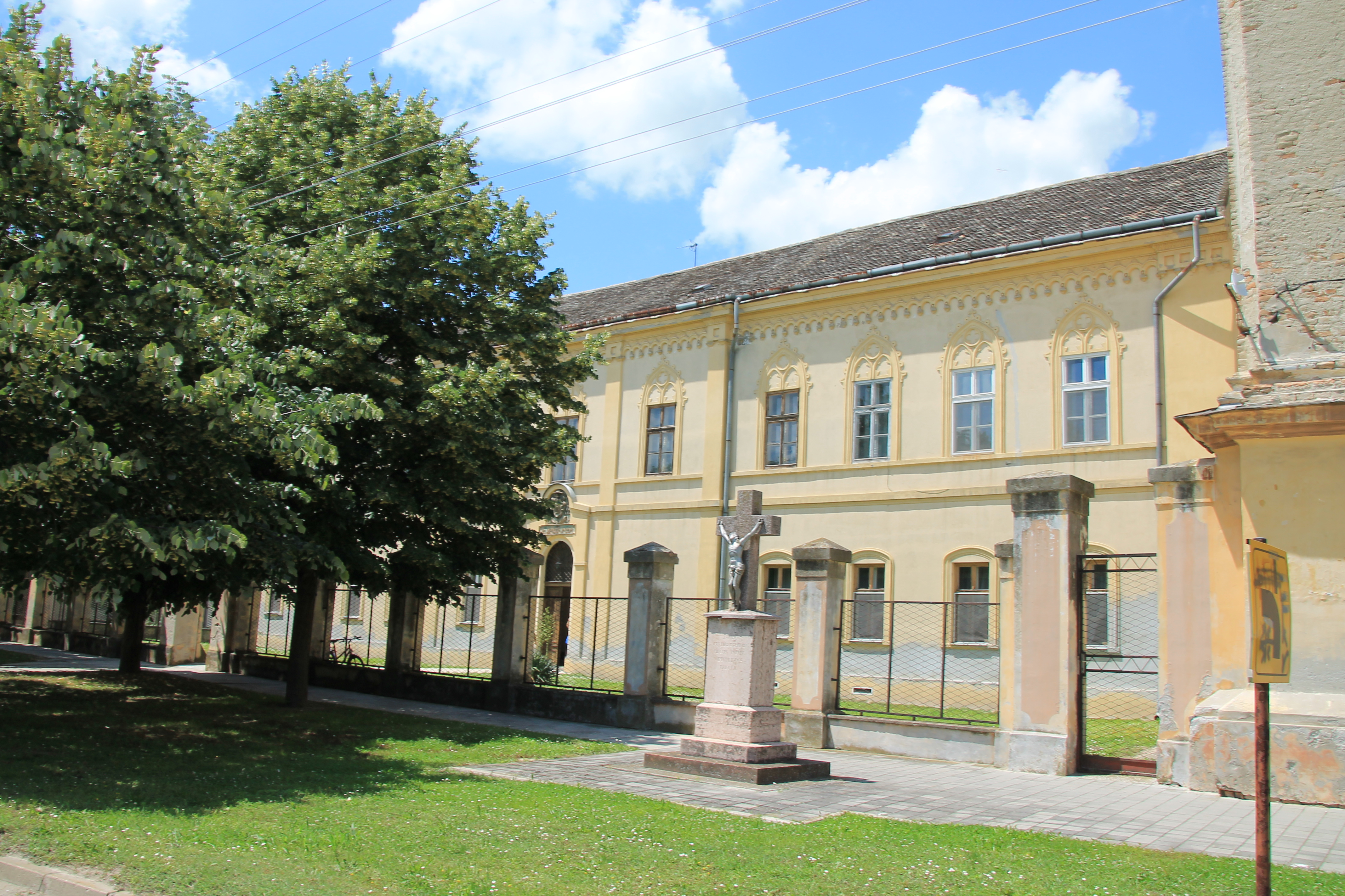 Samostan časnih sestara u Baču